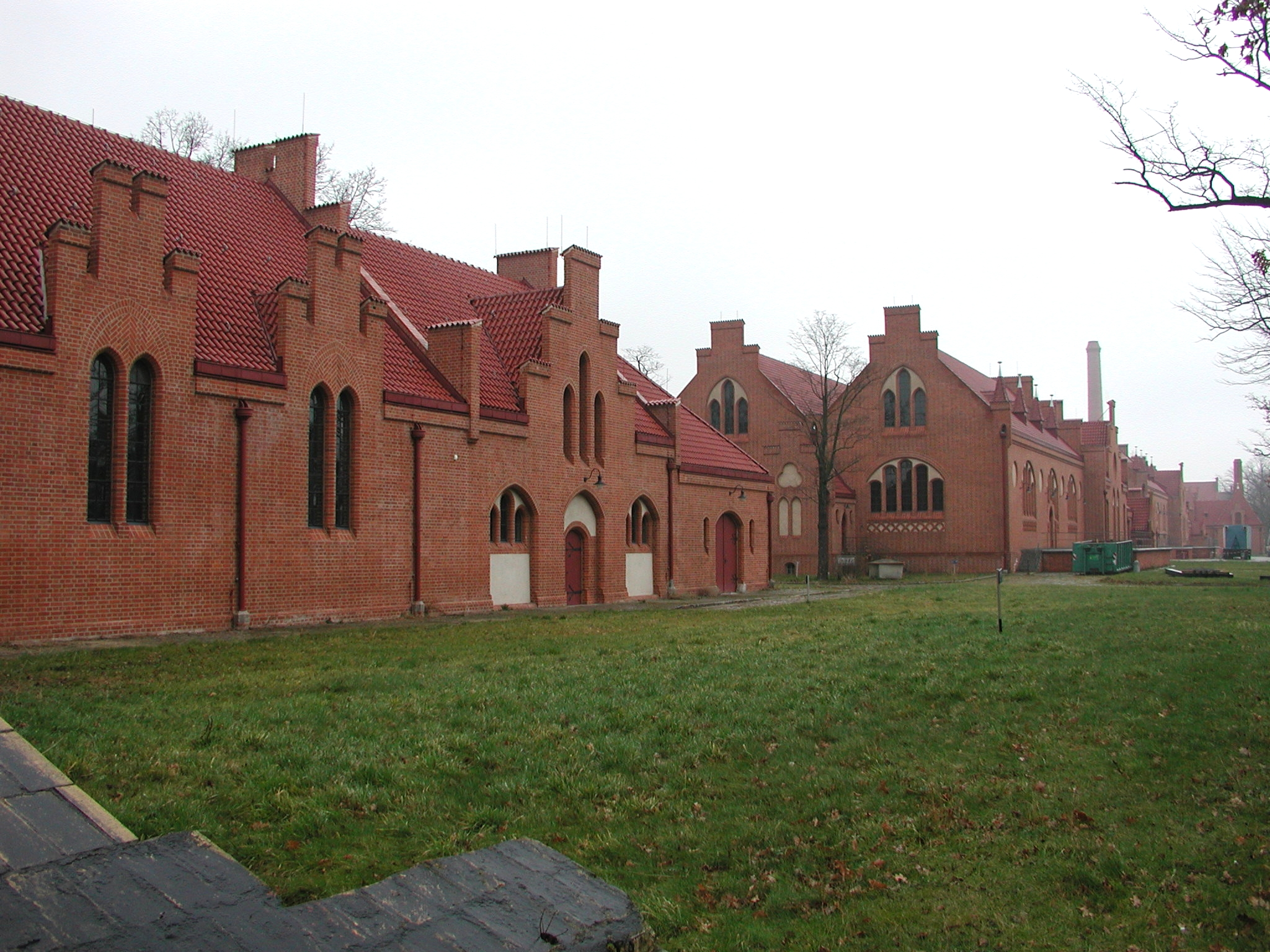 Berlin, Lichtenberg, Landsberger Allee, Wasser-Zwischenpumpwerk: Häuser A und B, von der Rückseite